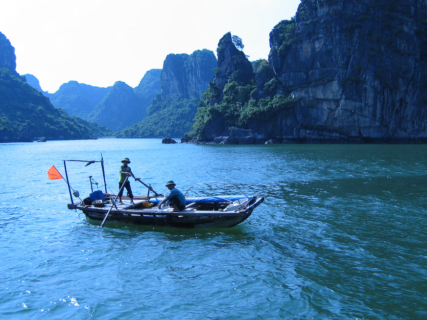 Fishing boat Halong Bay, Vietnam